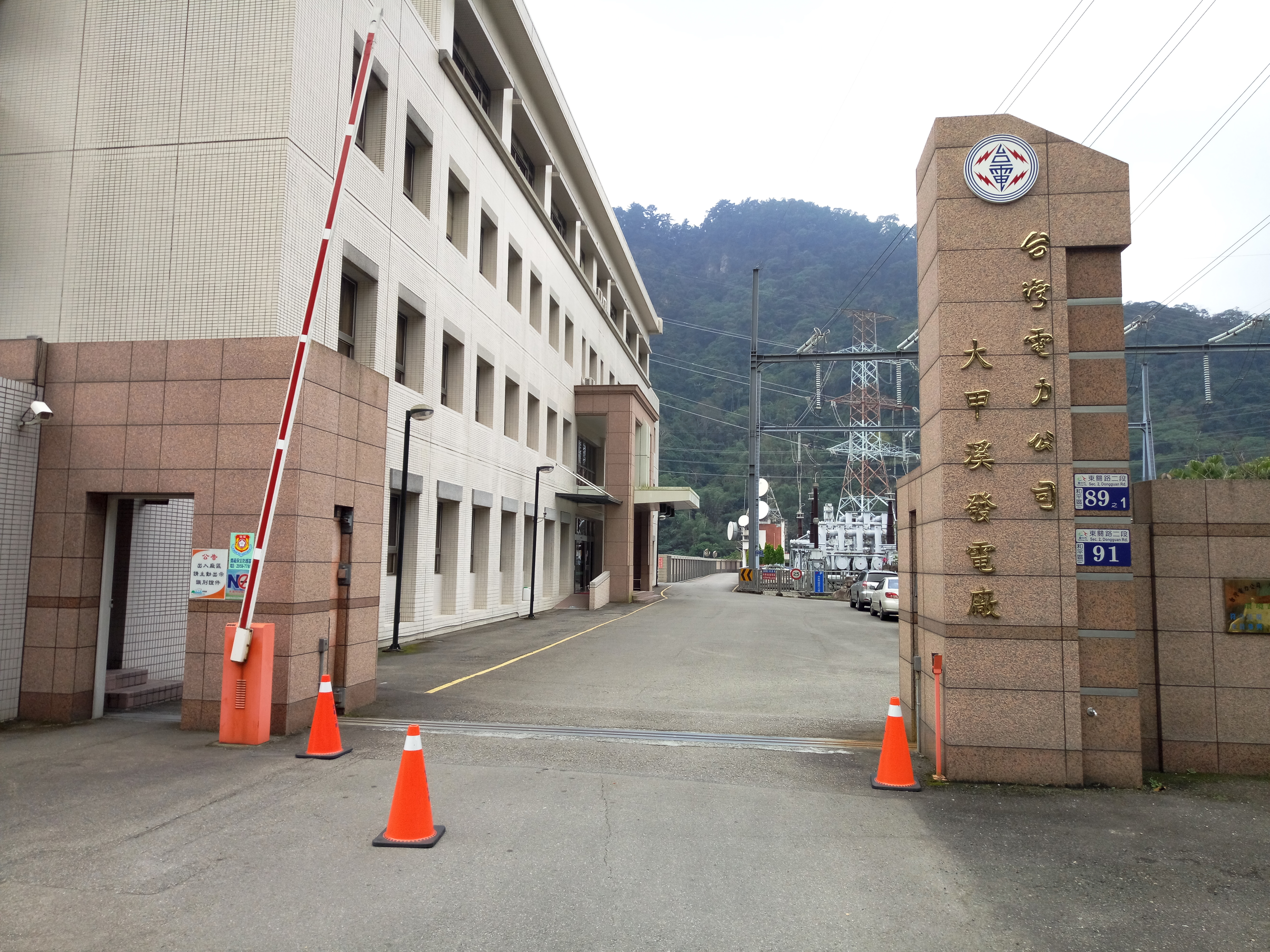 台電大甲溪發電廠廠本部大門